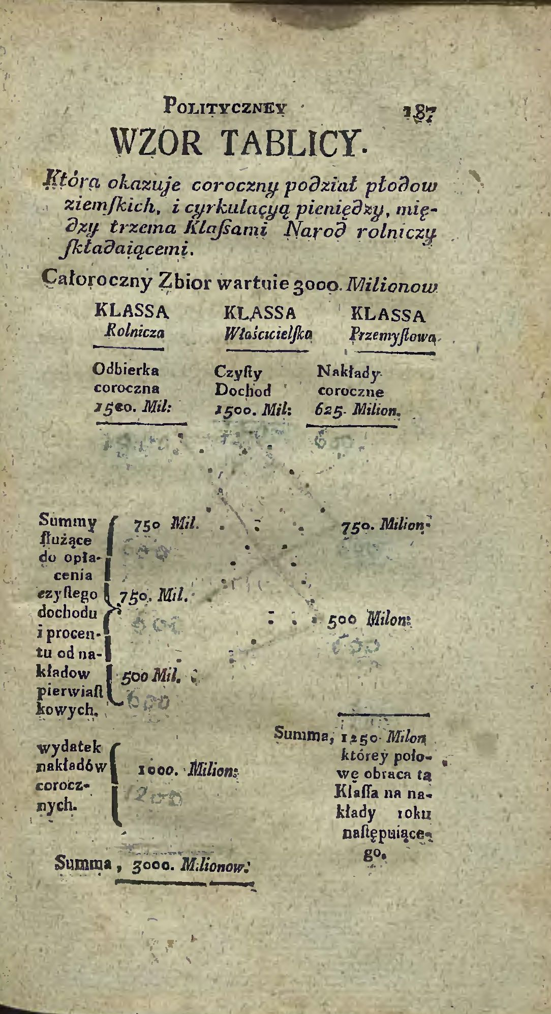 Hieronim Stroynowski, Tablica ekonomiczna, [w:] H. Stroynowski, Nauka Prawa Przyrodzonego, Politycznego, Ekonomiki Polityczney i Prawa Narodów, Wilno 1791.